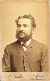 Porträt des Architekten Johannes Paul Richter